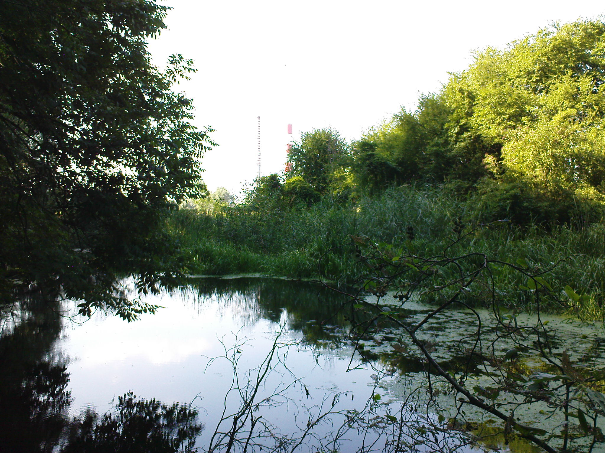 Malowniczy zakątek Jeziora Wilanowskiego u brzegów morysińskiego rezerwatu przyrody.